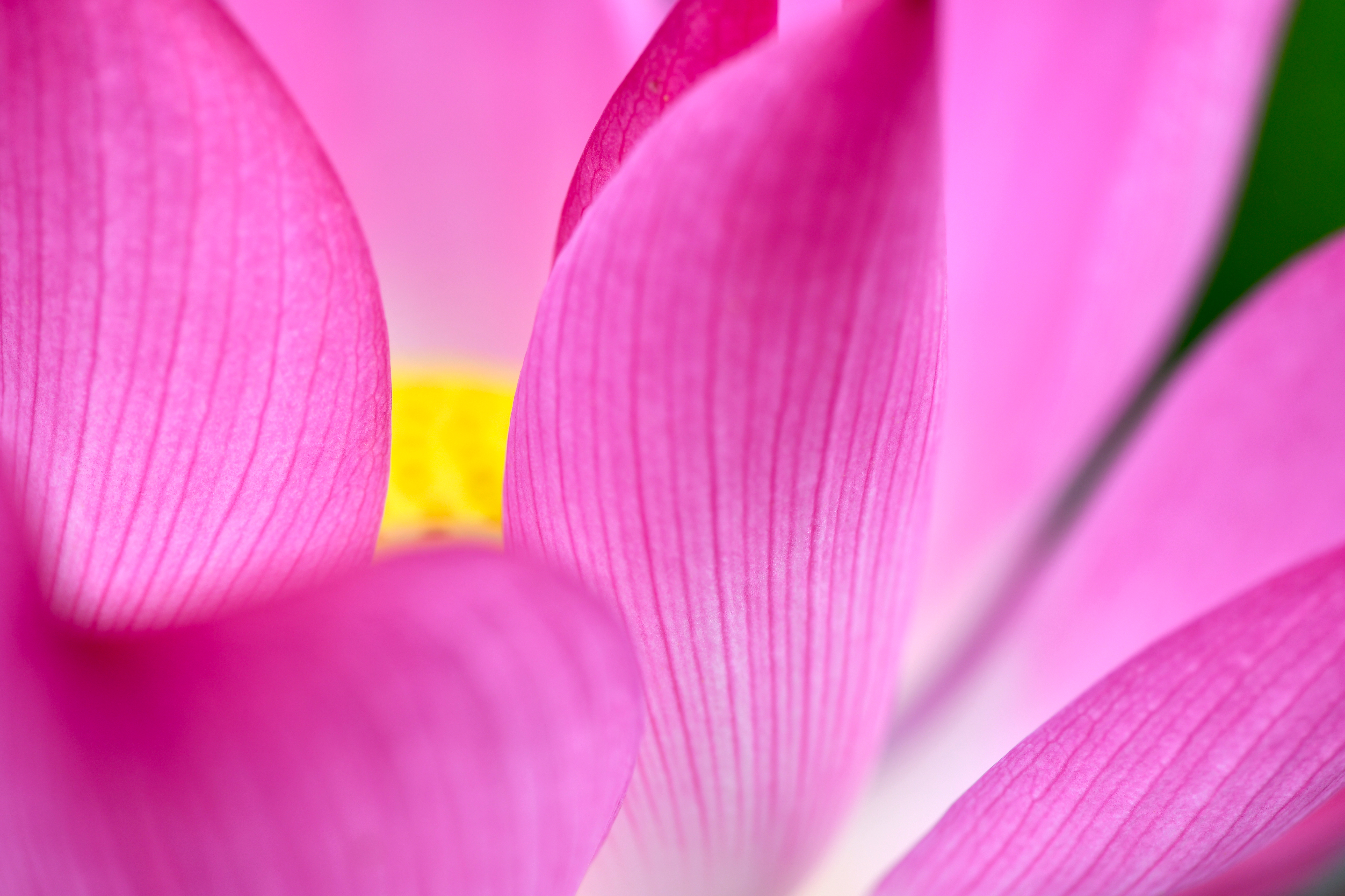 อุทยานแห่งชาติเขาใหญ่